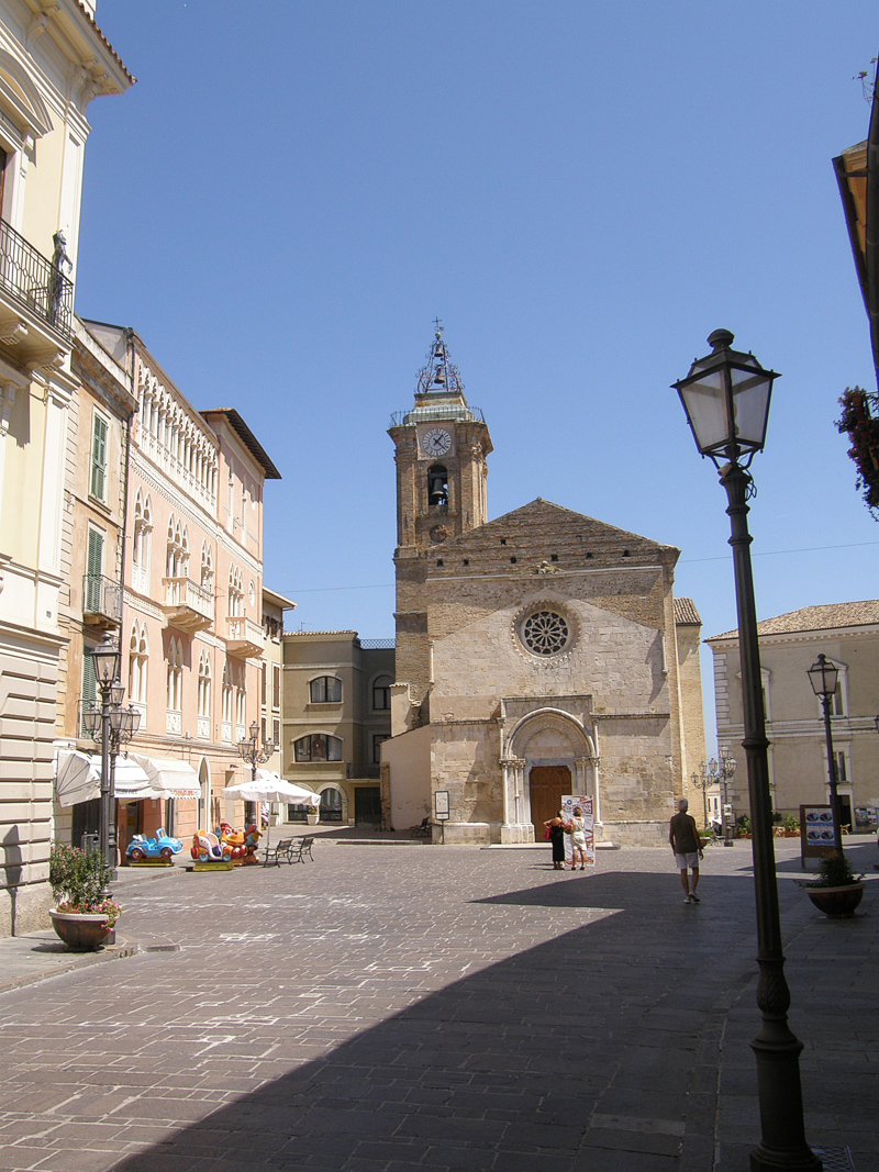 Vasto